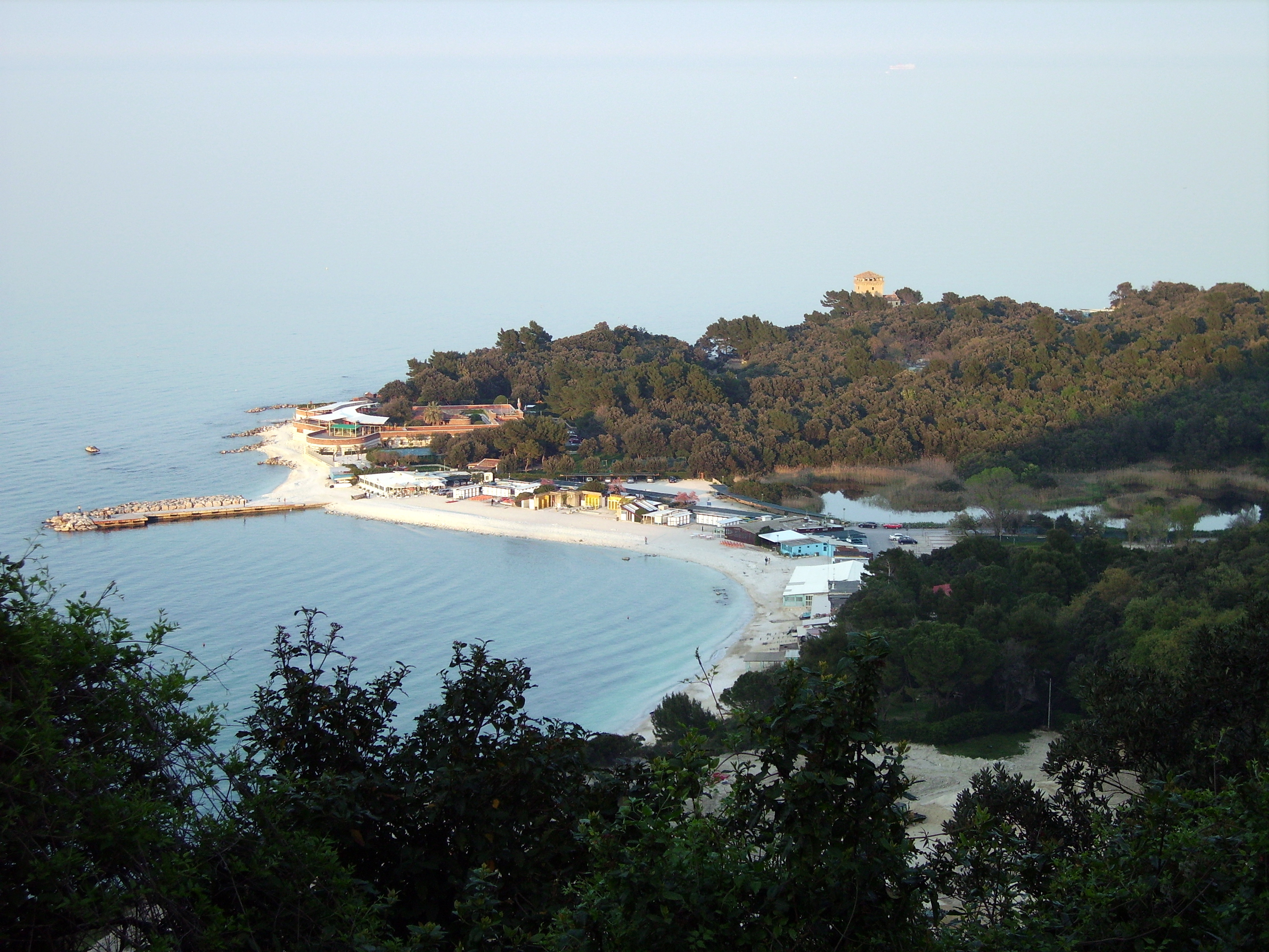 Vista dall'alto di Portonovo di Ancona.